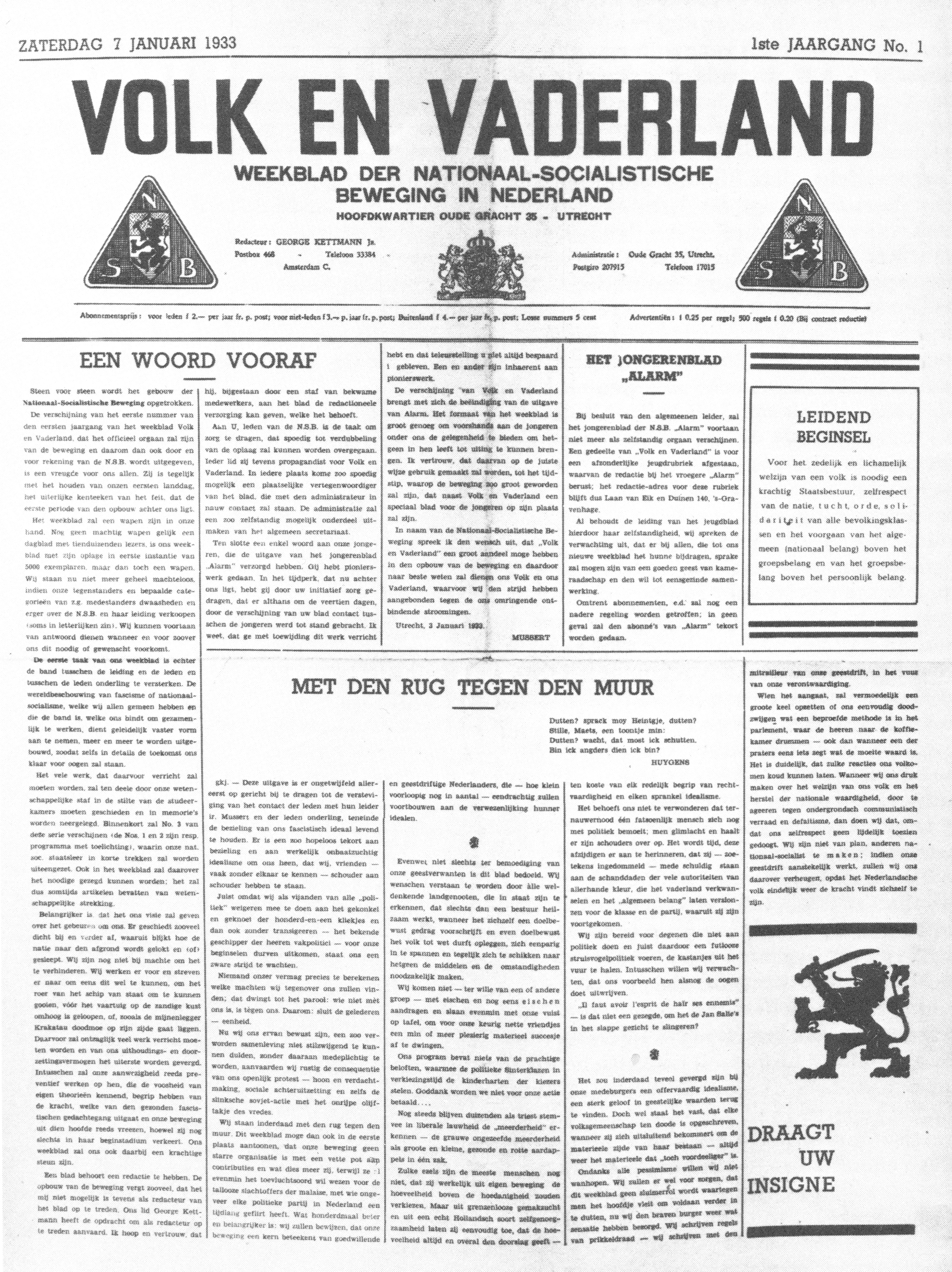 Scan van afbeelding zelf gemaakt. Wegens ouderdom (7 januari 1933) in het publieke domein geplaatst, vrij van rechten.